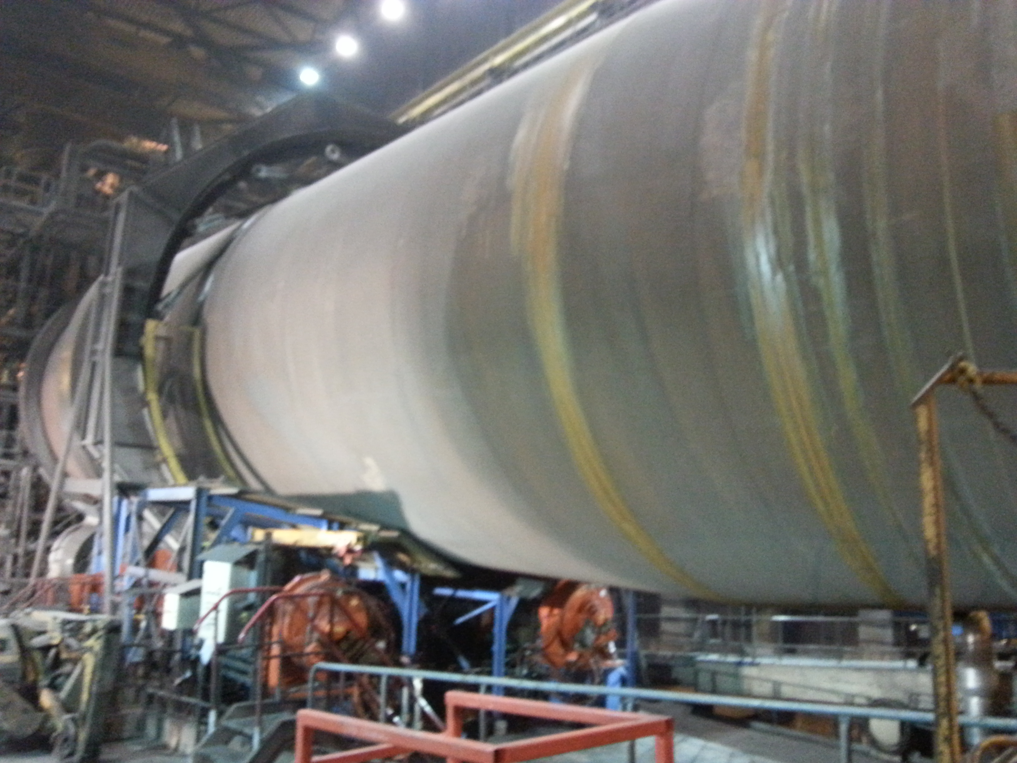 Roterugn